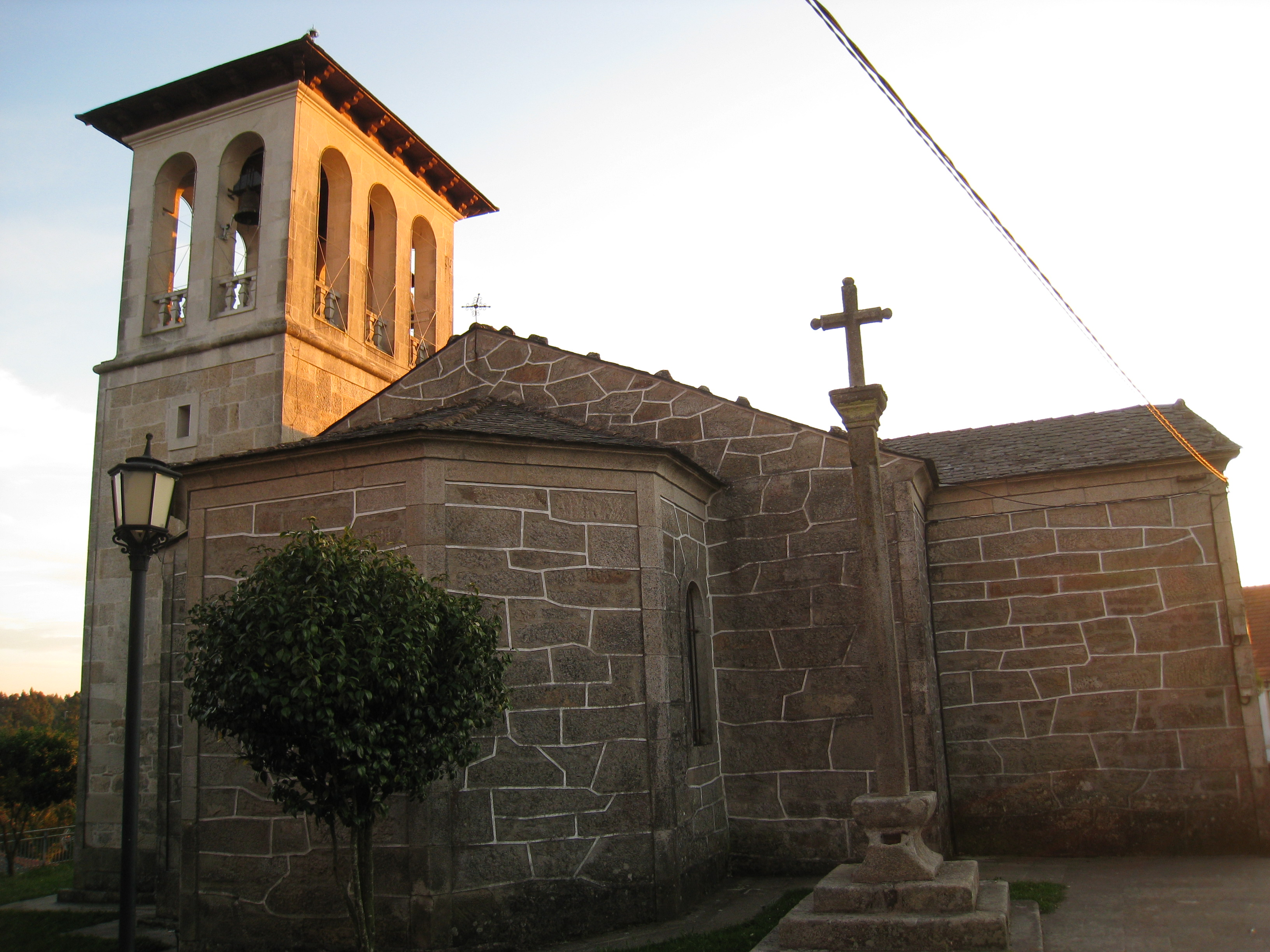 Eine Kirche in Palas de Rei, Spanien.